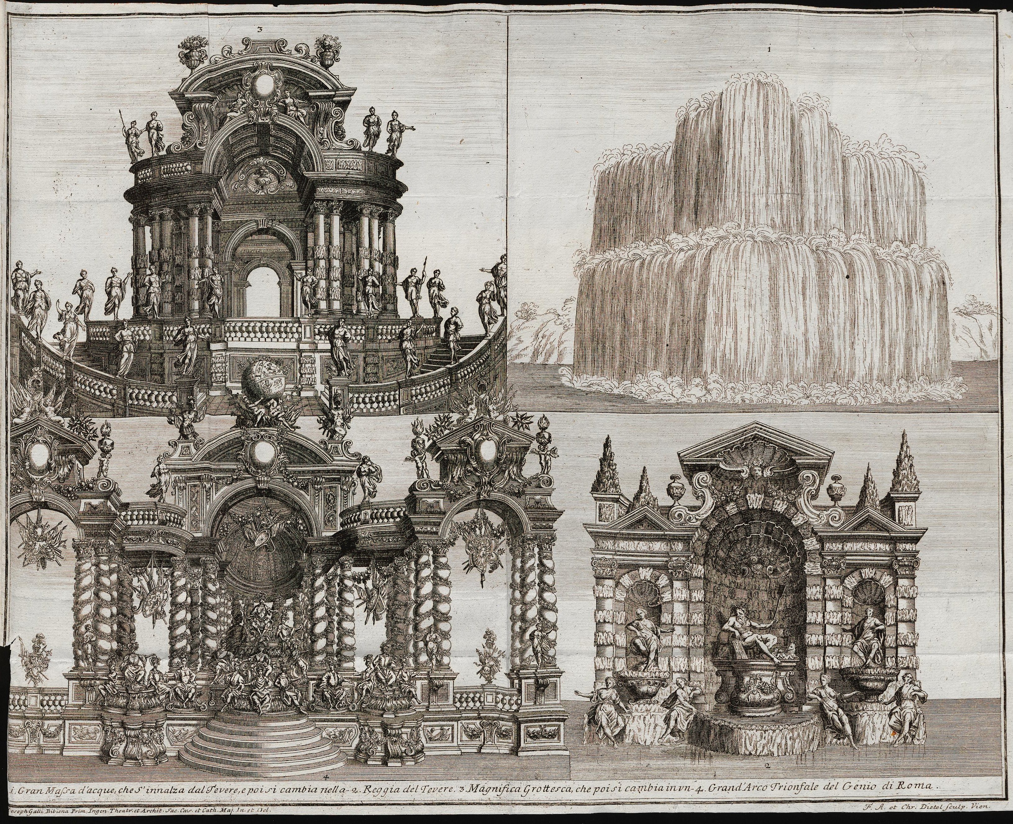 Grafik aus dem Klebeband Nr. 15 der Fürstlich Waldeckschen Hofbibliothek Arolsen Costanza e fortezza, Oper von Johann Joseph Fux (Musik), Pietro Pariato (Libretto), uraufgeführt 28. August 1723 in Prag zur Krönung Karl VI. zum König von Böhmen. Theaterarchitektur und Bühnenbilder von Giuseppe Galli da Bibiena. Motiv: "1. Gran Massa d'acque che s'innalza dal Tevere, e poi si cambia nella 2. Reggia del Tevere, 3. Magnifica Grottesca, che poi si cambia in vn 4. Grand'Arco Trionfale del Genio di Roma" Bühnenbilder für das Finale: Eine große Wassermasse erhebt sich aus dem Tiber. Sie verwandelt sich in das Reich des Flussgotts. Eine prächtige Grotte, die sich in den großen Triumphbogen des Genius von Rom verwandelt.